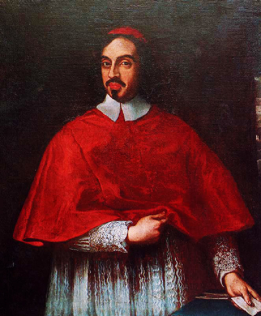 Ritratto di Rinaldo d'Este (1618-1672)